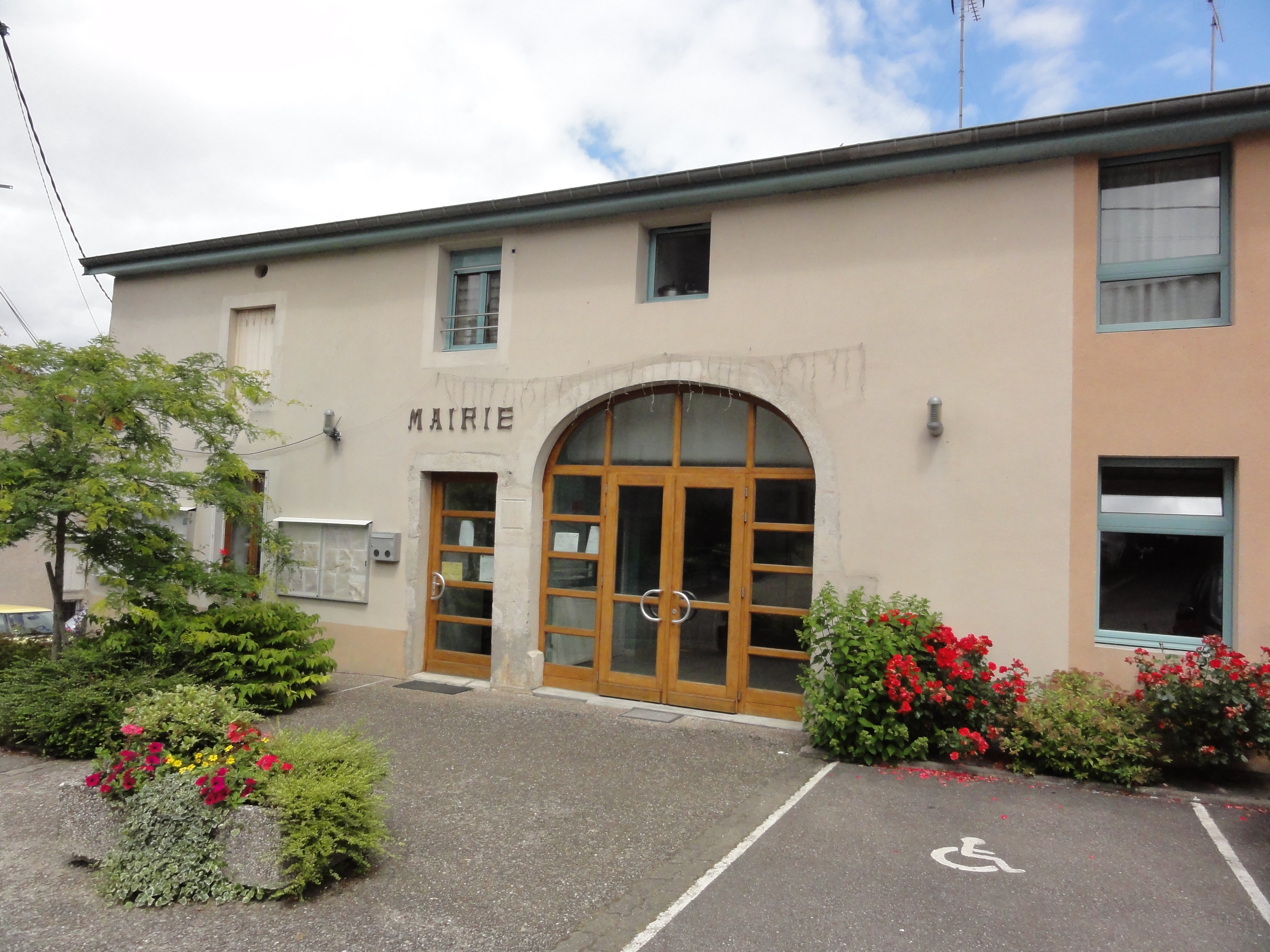 Benney (M-et-M) mairie